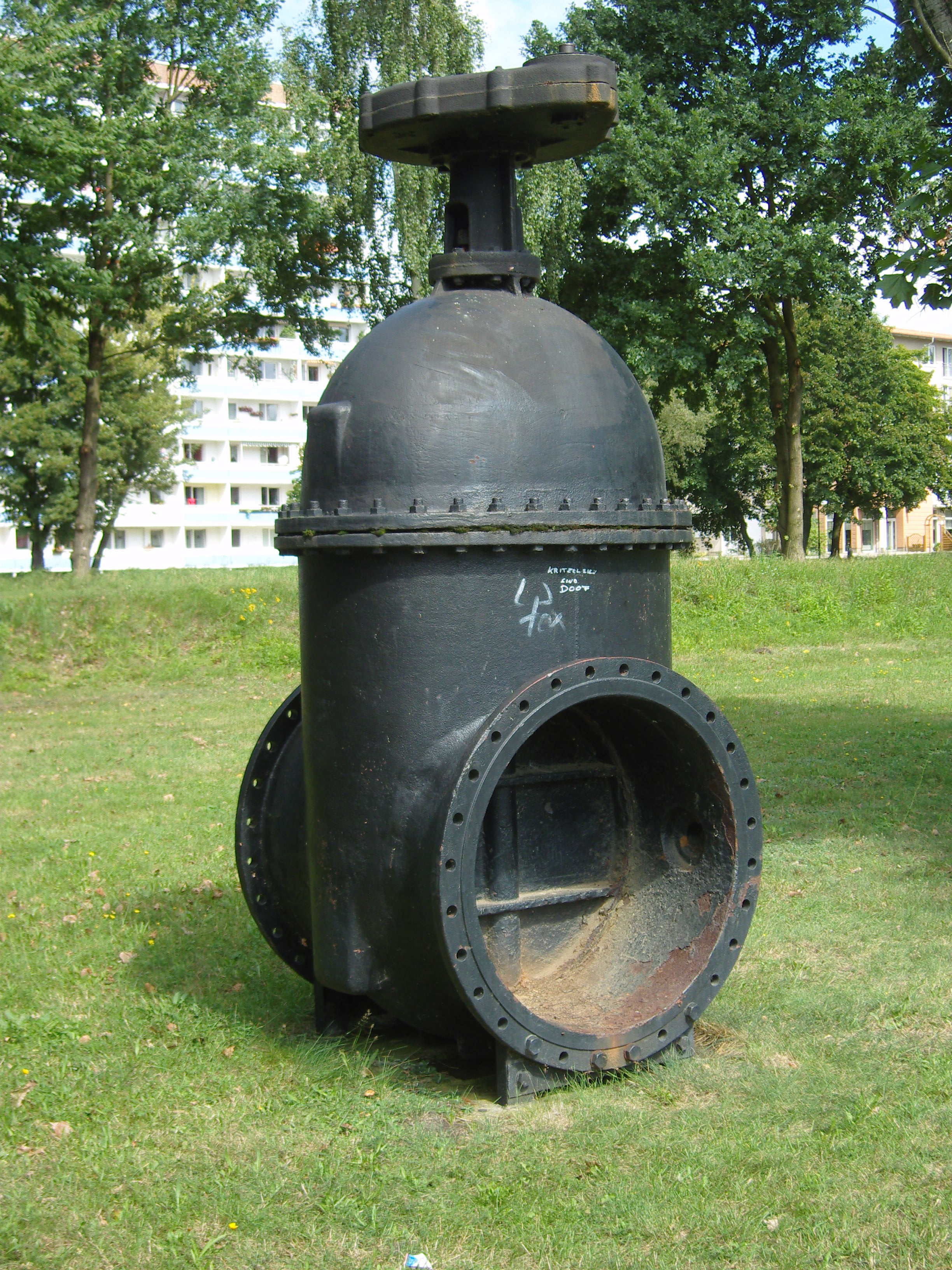 Schieber an der Stelle an der von 1967 bis 1972 der Senftenberger See von der Schwarzen Elster aus geflutet wurde